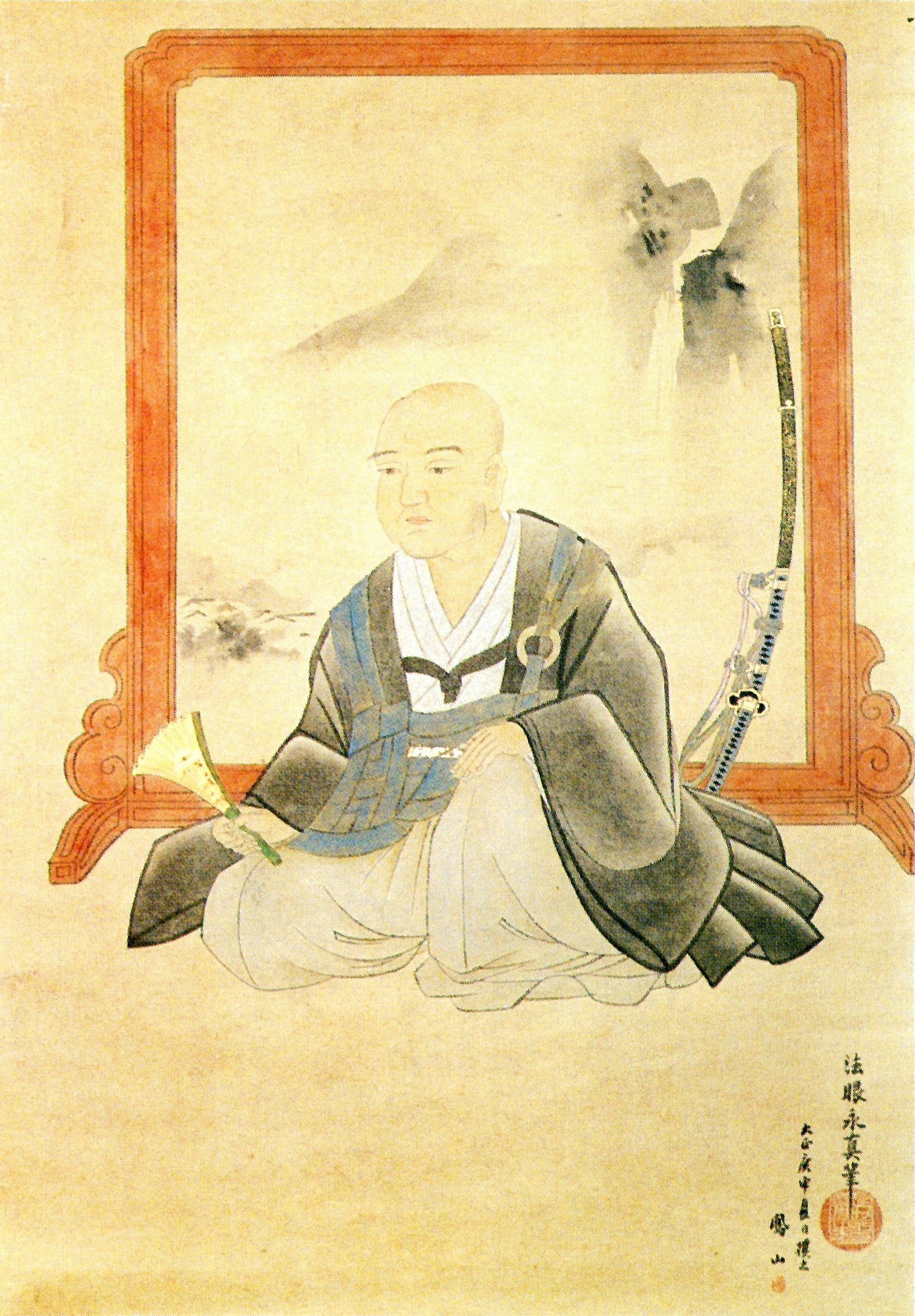 金森頼直の肖像。